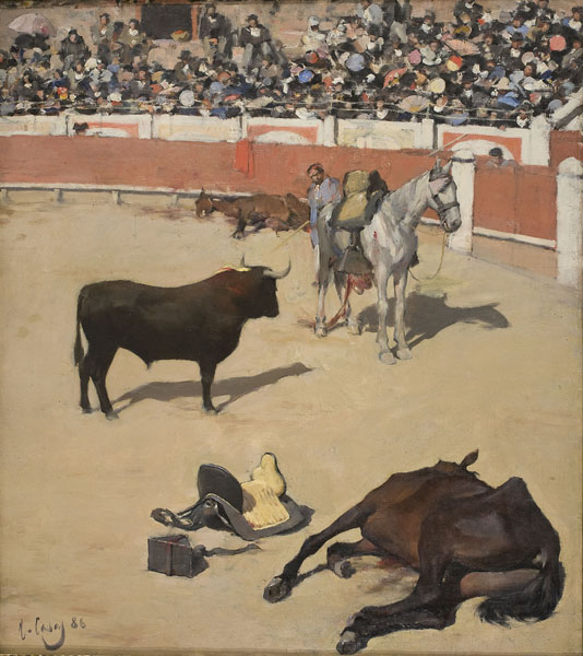 Catalan: Toros (Cavalls morts) o A l'estiu, tota cuca viutitle QS:P1476,ca:"Toros (Cavalls morts) o A l'estiu, tota cuca viu" label QS:Lca,"Toros (Cavalls morts) o A l'estiu, tota cuca viu"